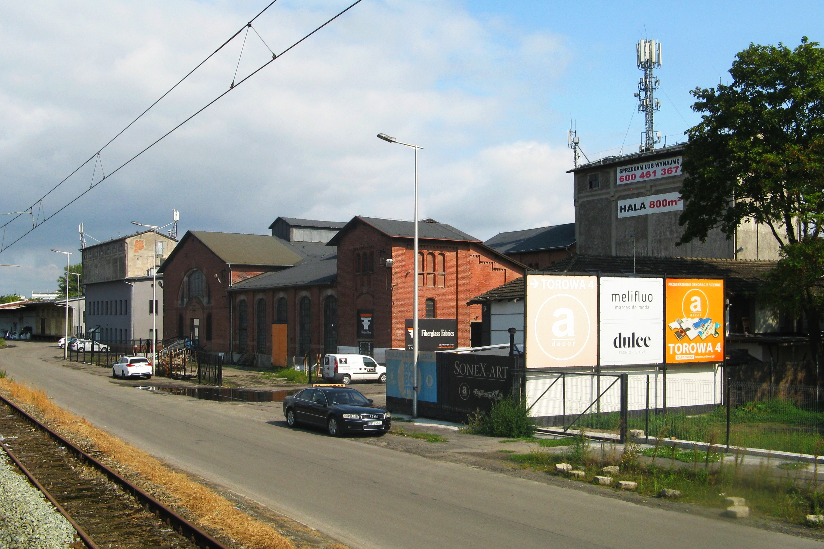 zabudowania dawnej cementowni Giesel w Opolu-Groszowicach przy ul. Torowej 4, widok z okna pociągu